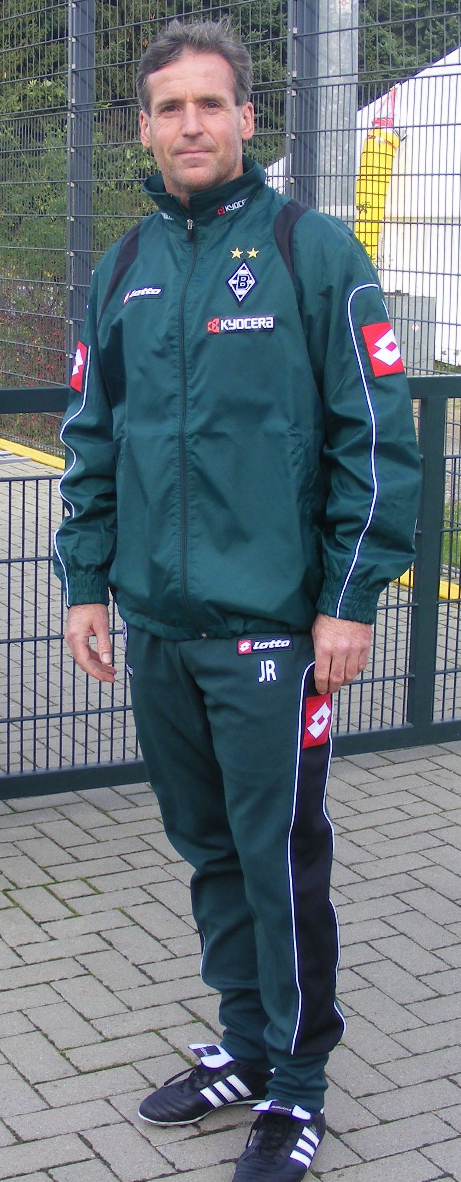 Jürgen Raab